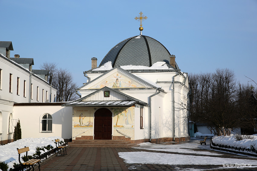 Магілёў. Ануфрыеўская царква